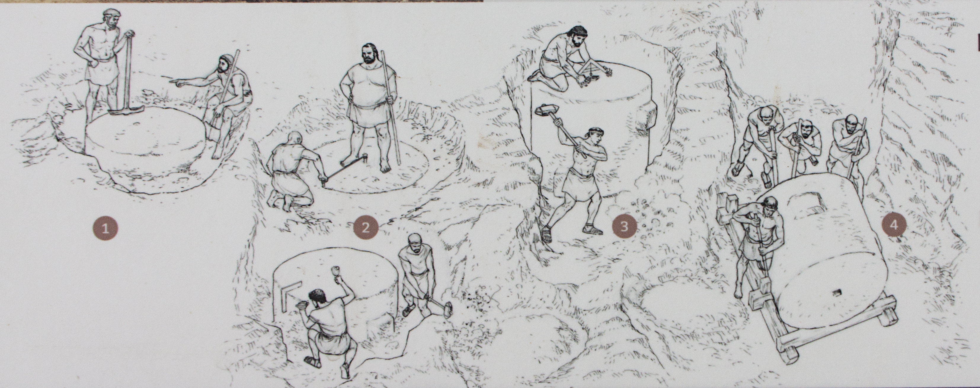 1. pulizia e suddivisione della porzione di roccia prevista per l'estrazione 2. scavo intorno al rocchio 3. distacco dal rocchio 4. abbattimento del rocchio e posa su slitte o ruote di legno dei blocchi per il trasporto in cantiere